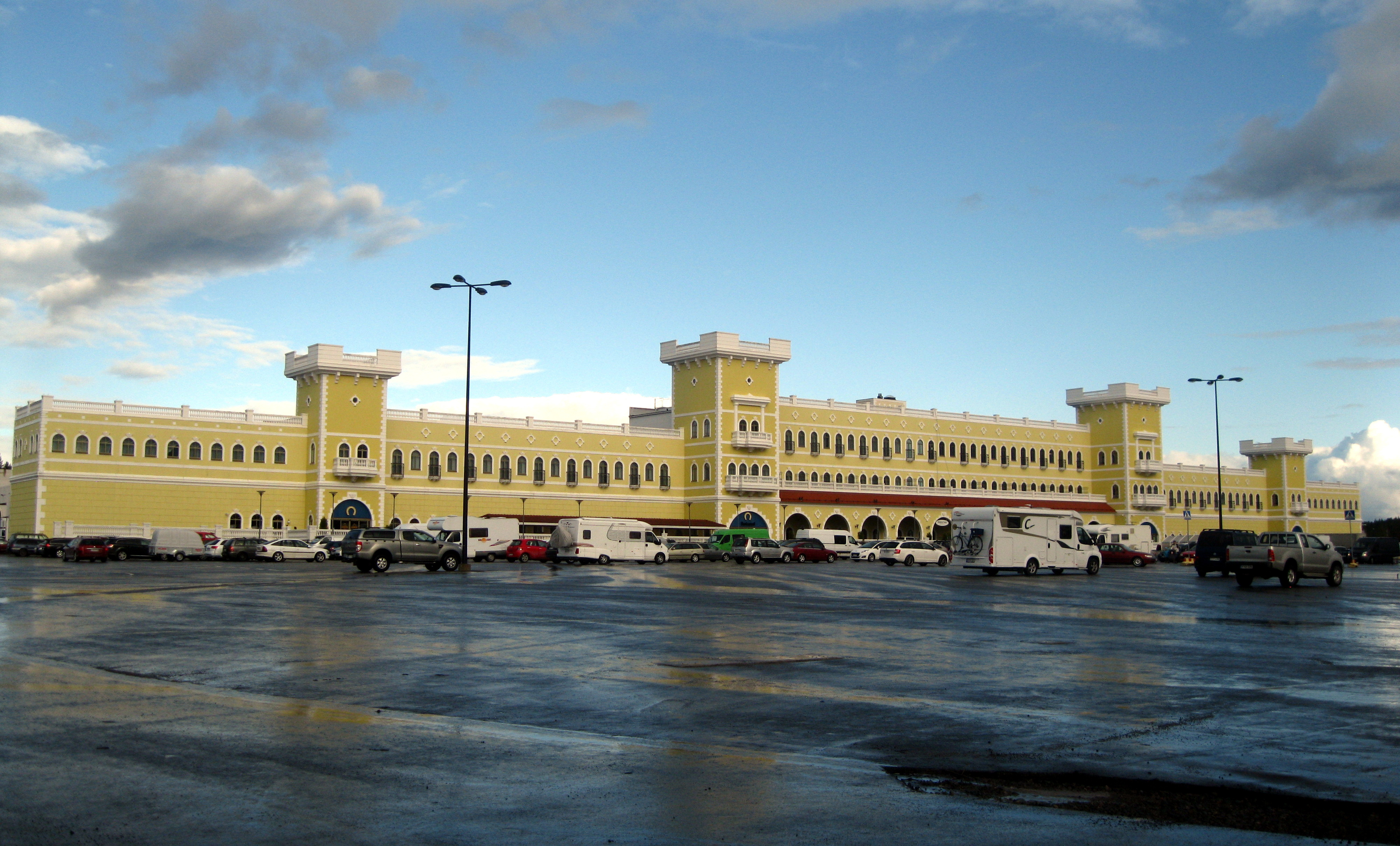 Veljekset Keskisen ruokapuoti toukokuussa 2015.